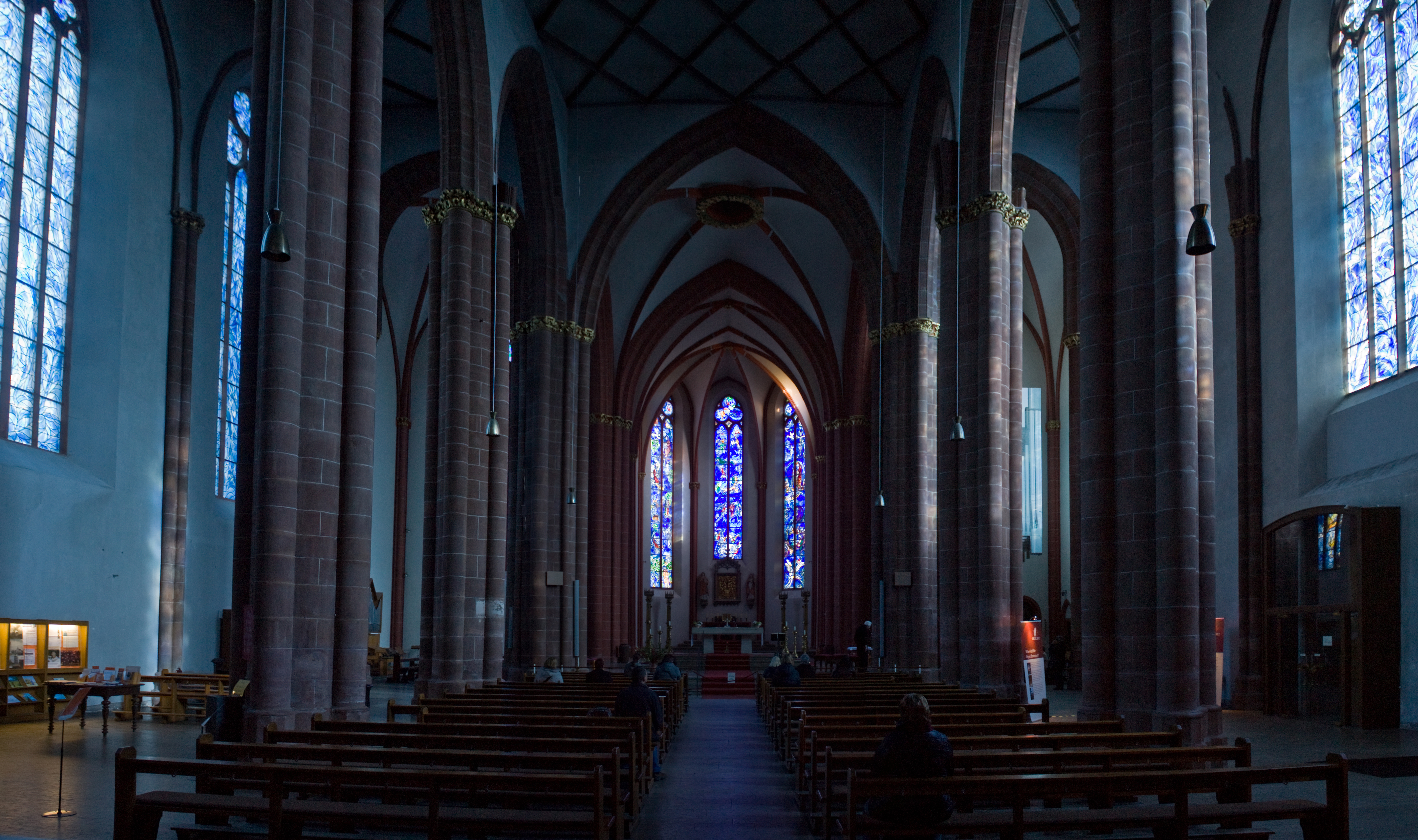 Stefansstraße 9, Mainz - Katholische Pfarrkirche St Stefan innenraum